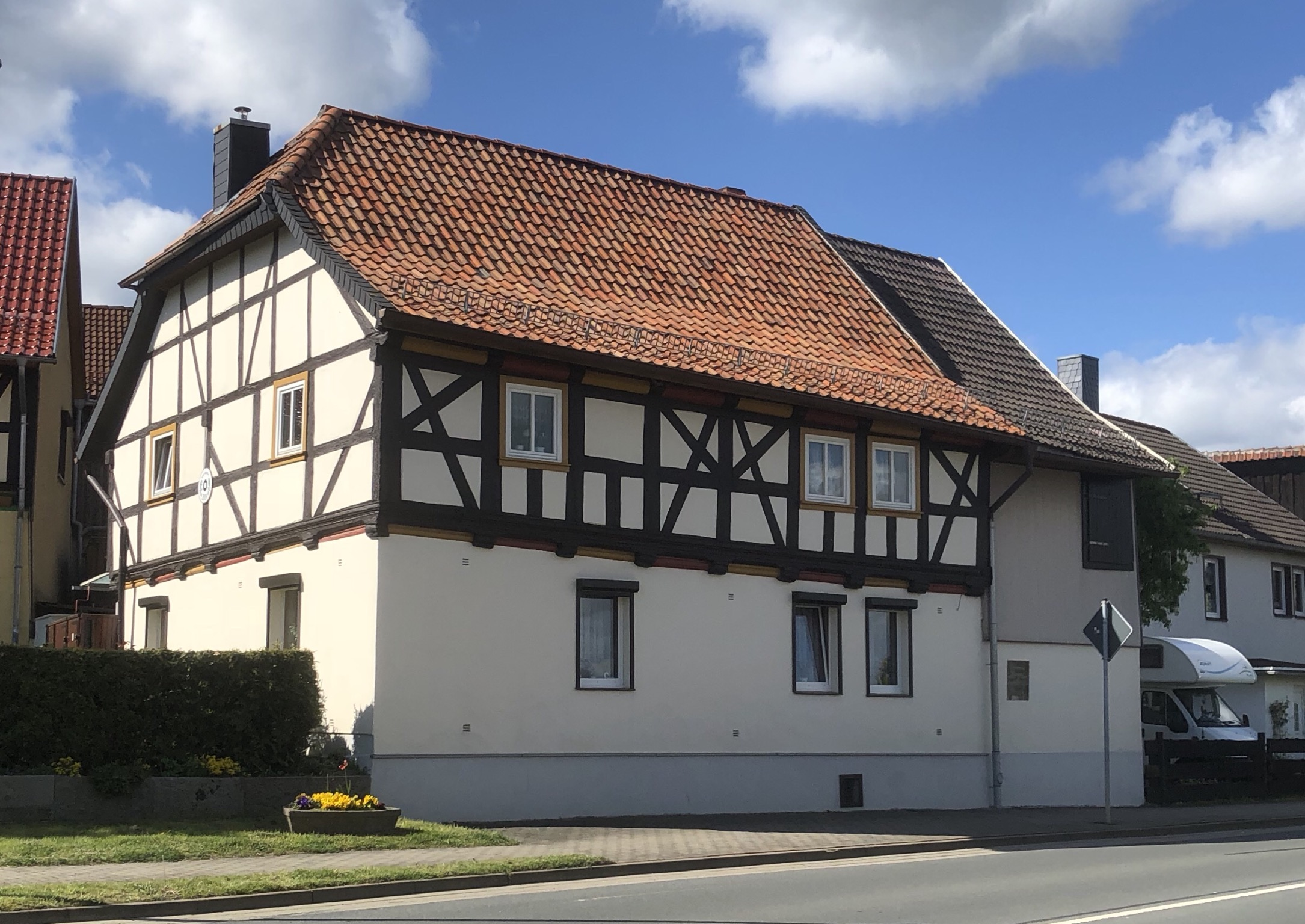 Wilhelm-Pieck-Straße 36 in Heimburg